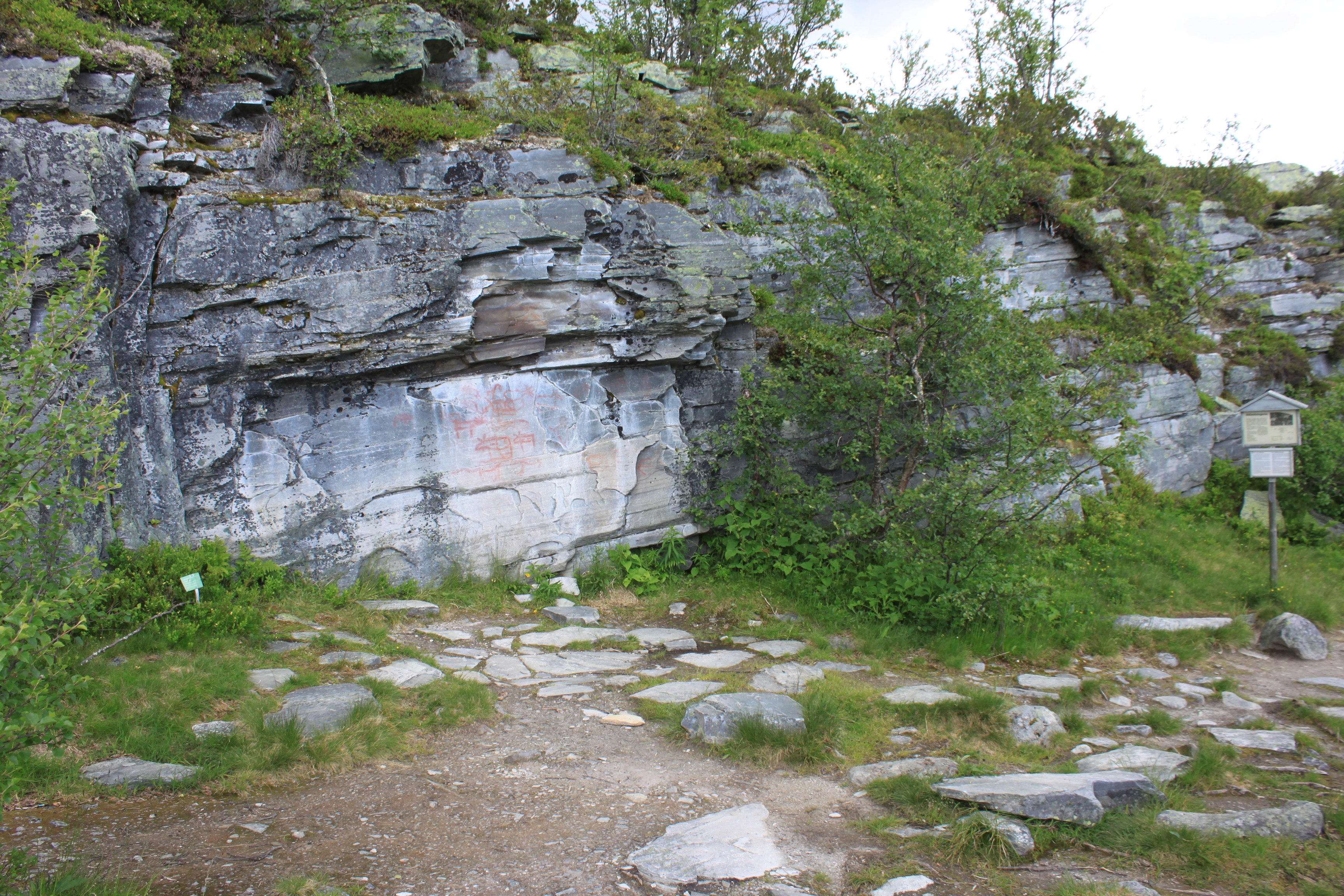 Tännäs 58:1. Hällmålning. Fast fornlämning.